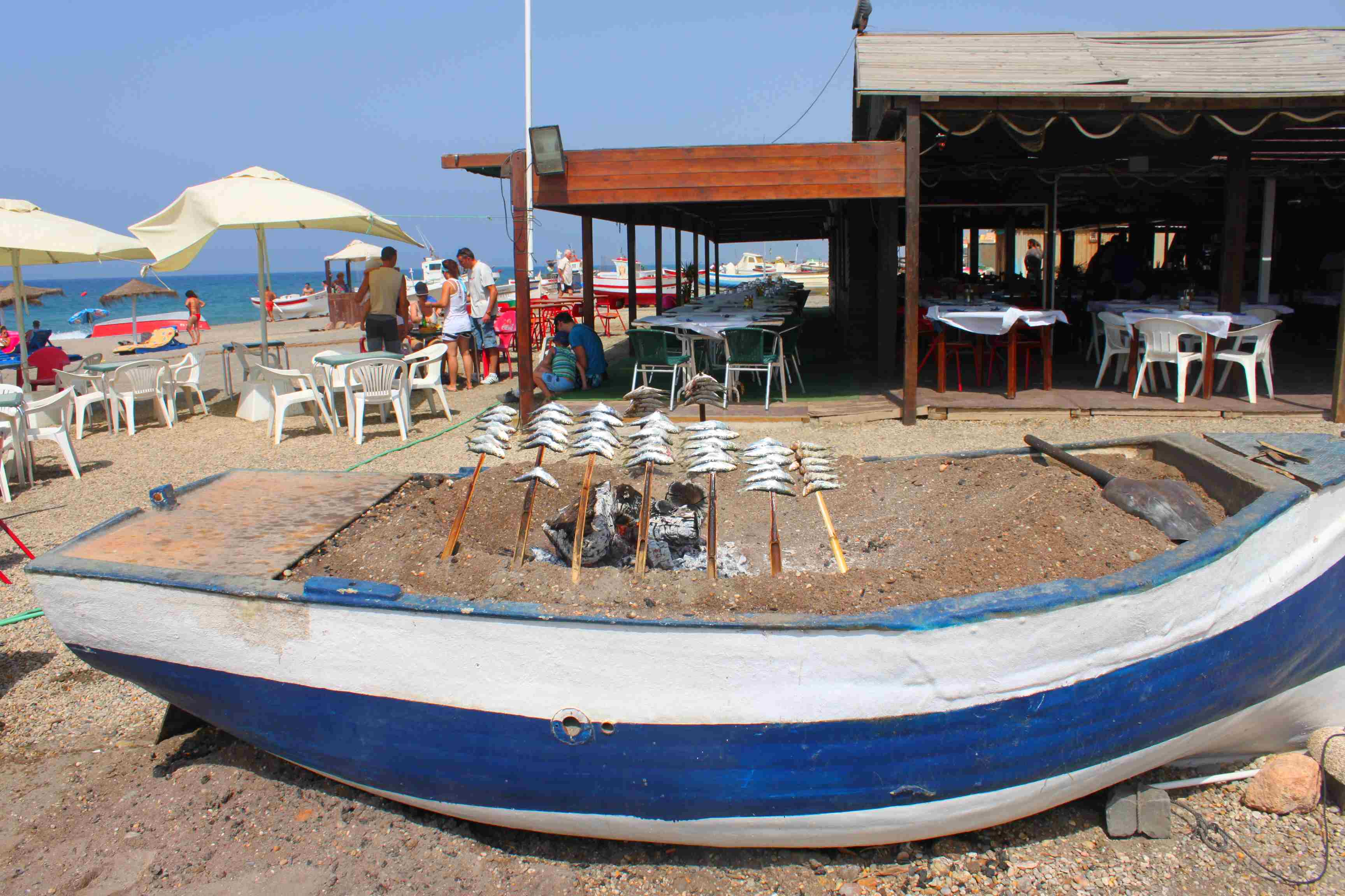 Direkt am Strand San Miguel liegt das Strand-Restaurant Chiribus mit. Es stehen viele Fischgerichte auf der Speisekarte, die Spezialität sind die gegrillten Sardinen.